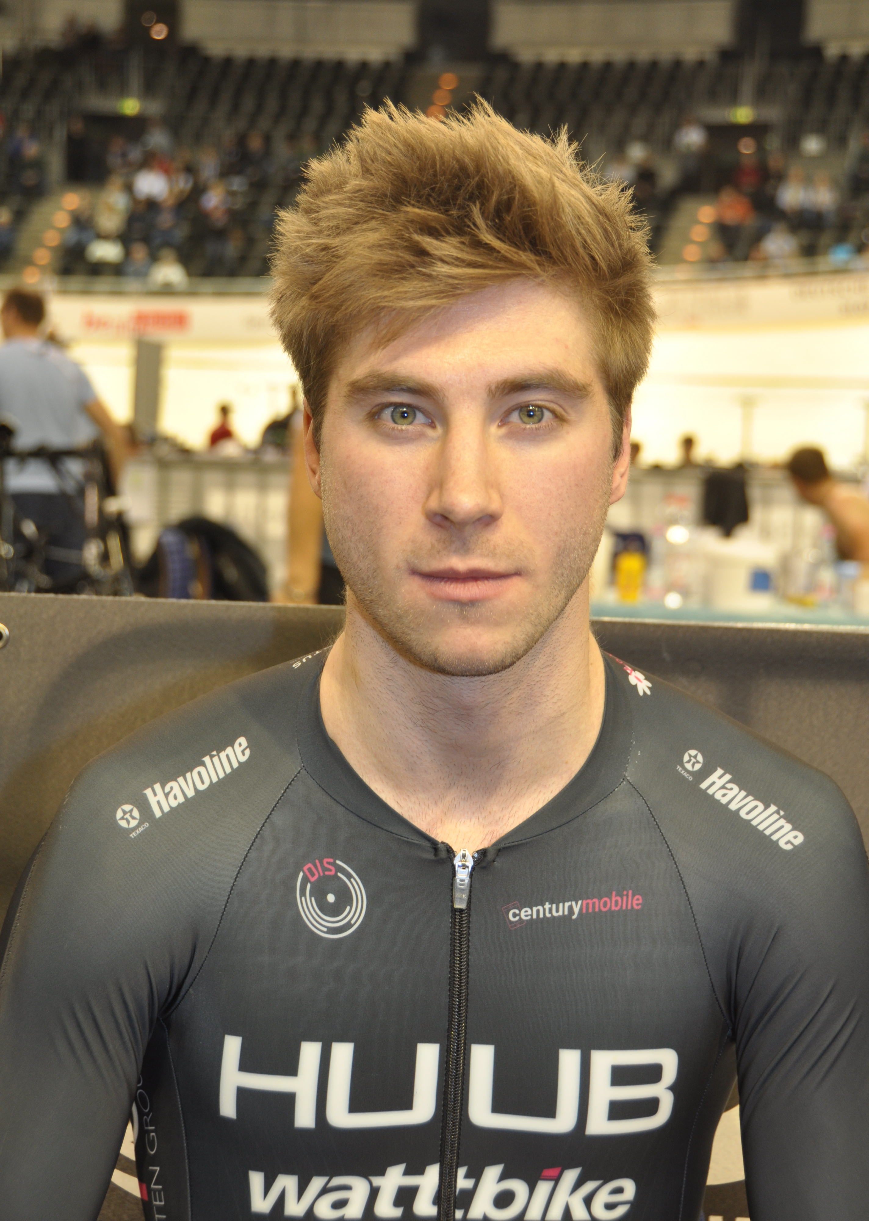 Jonathan Wale, britischer Radsportler